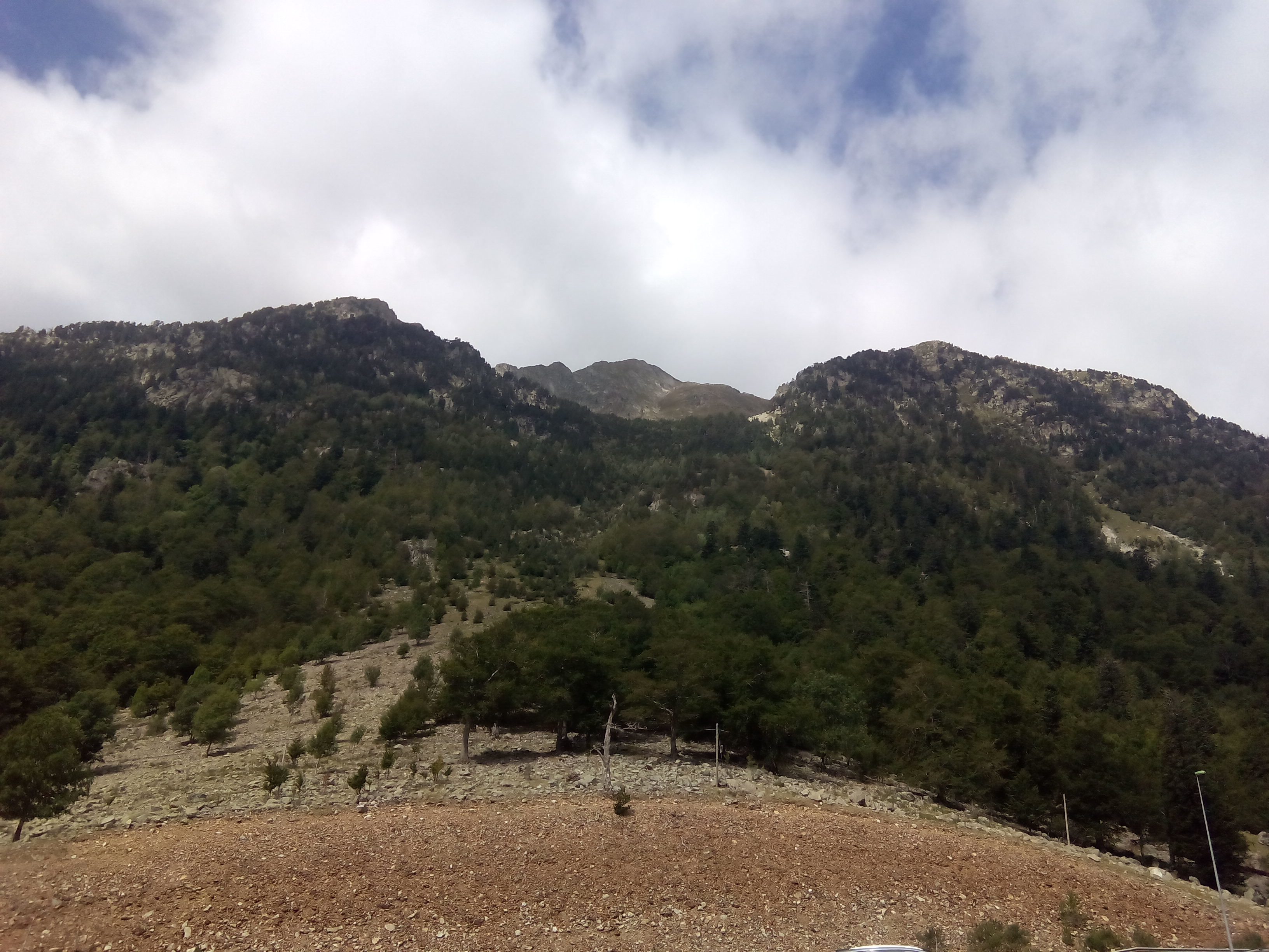 Tuc de Fontana de Vielha visto des de la carretera de Viella